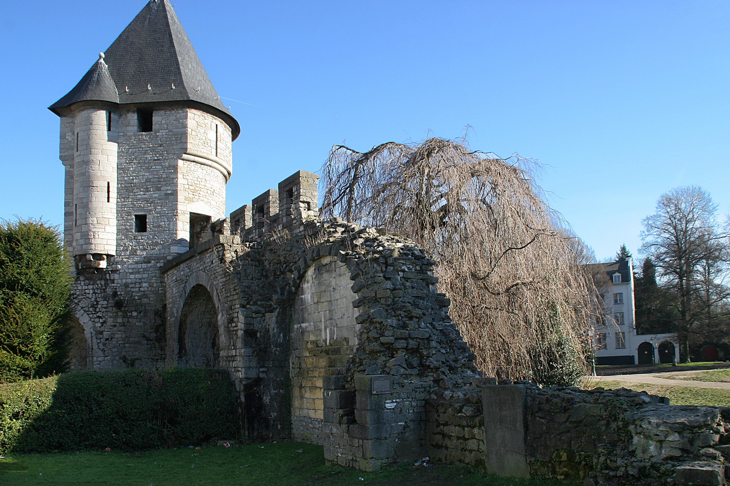 De Pater Vincktoren, onderdeel van de oude stadswallen van Maastricht